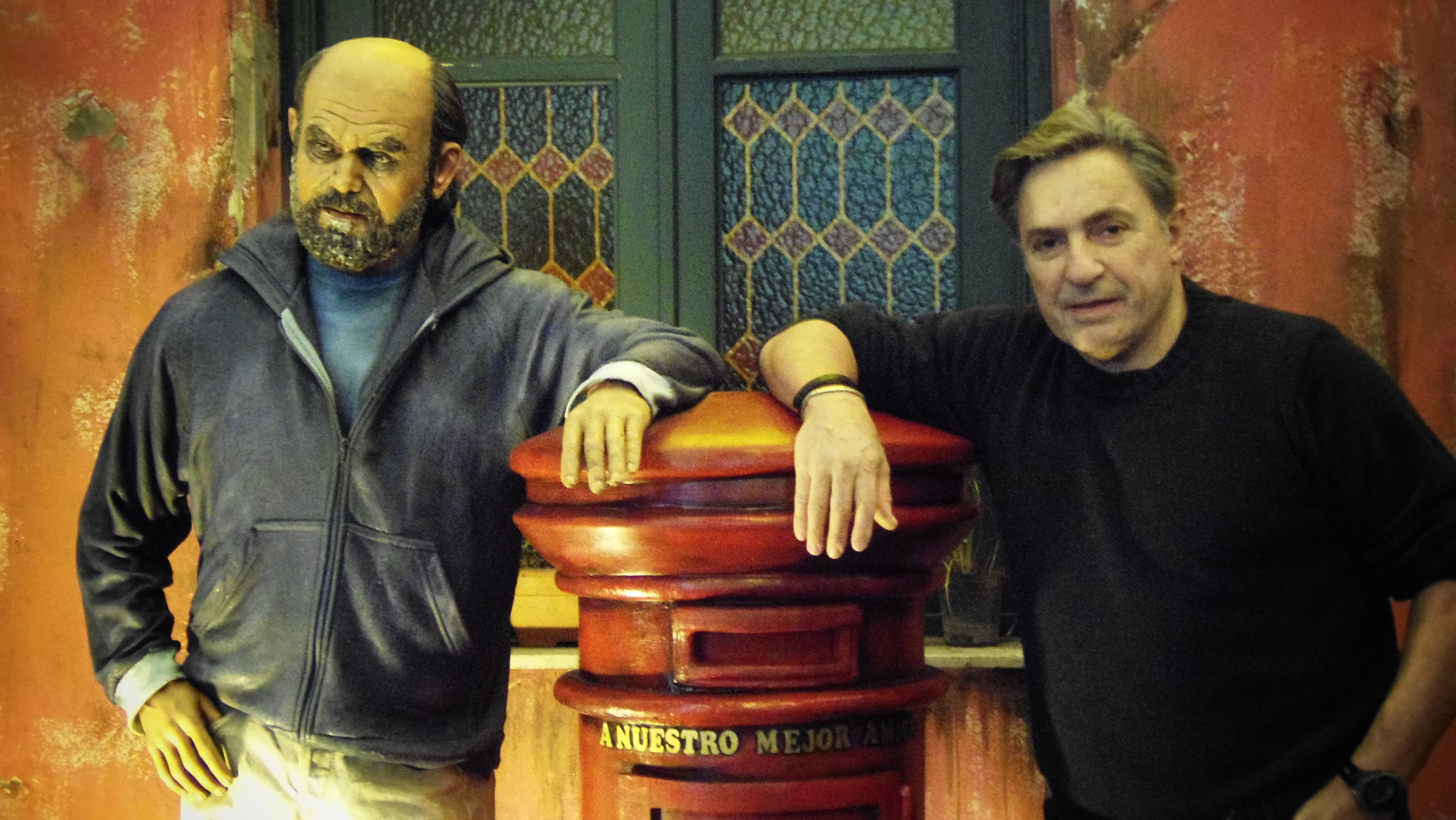 Antonio Grimau en Rosario durante una gira con la obra "El Precio".